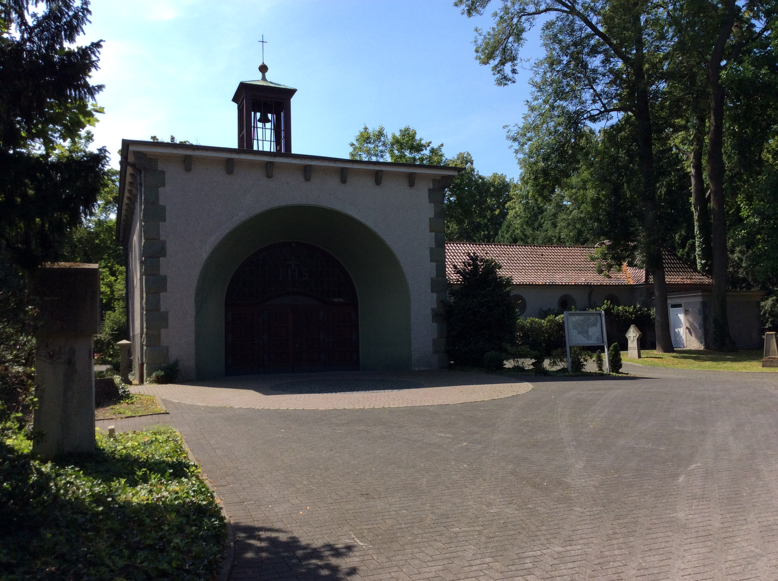 Die Einsegnungs- und Leichenhalle